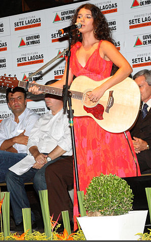 A cantora e compositora Paula Fernandes foi convidada pelo prefeito Maroca para se apresentar no evento em que foi celebrado convênio entre prefeitura e governo do estado. Paula Fernandes, cantora de renome nacional, homenageou a a cidade e também o estado de Minas Gerais na presença do prefeito Maroca, governador Aécio Neves, vice-governador Antonio Anastasia, prefeitos da região e tantas outras lideranças. Data: 20 de março Local: Estação Brasil Créditos: Quim Drummond